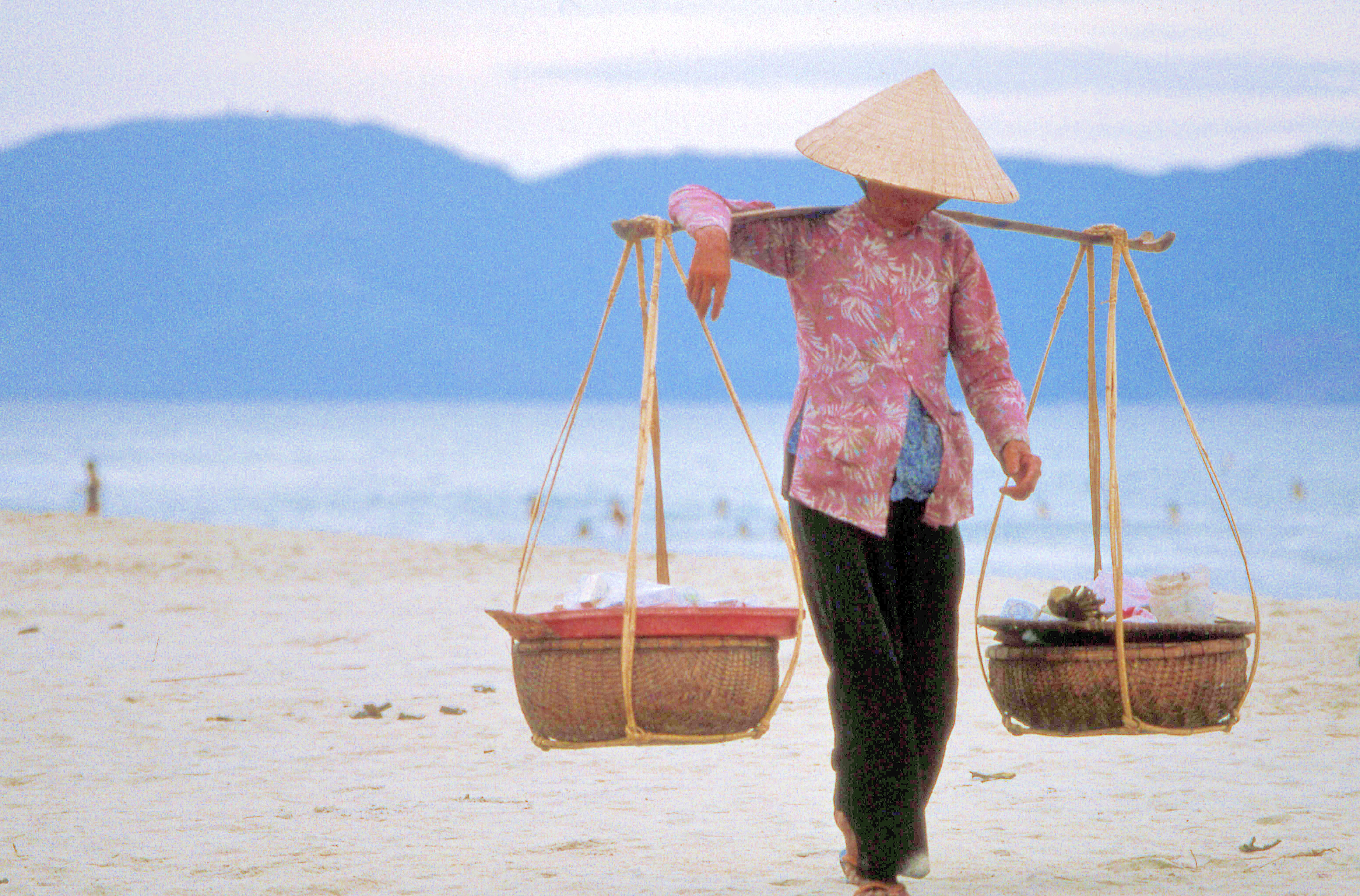 Danang_487.jpg VIETNAM nikon f801